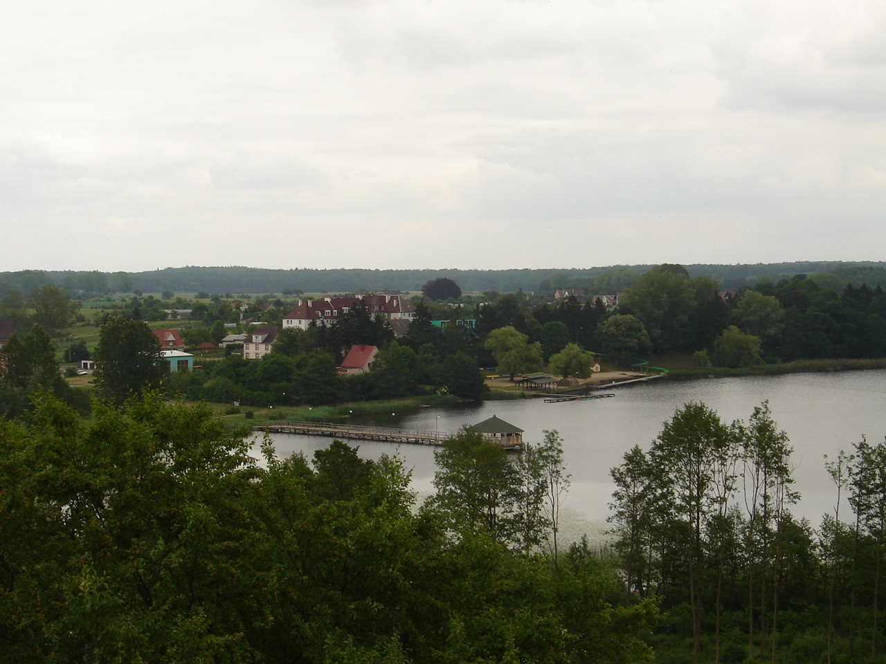 Jezioro Szczucze w Golczewie, woj. zachodniopomorskie